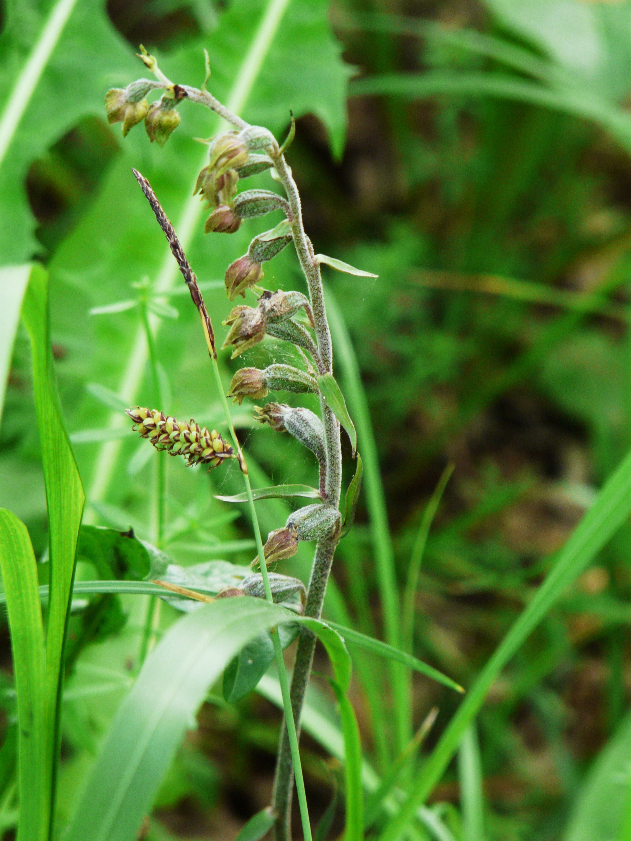 Épipactis à petites feuilles (Epipactis microphylla), Trélissac, Dordogne, France